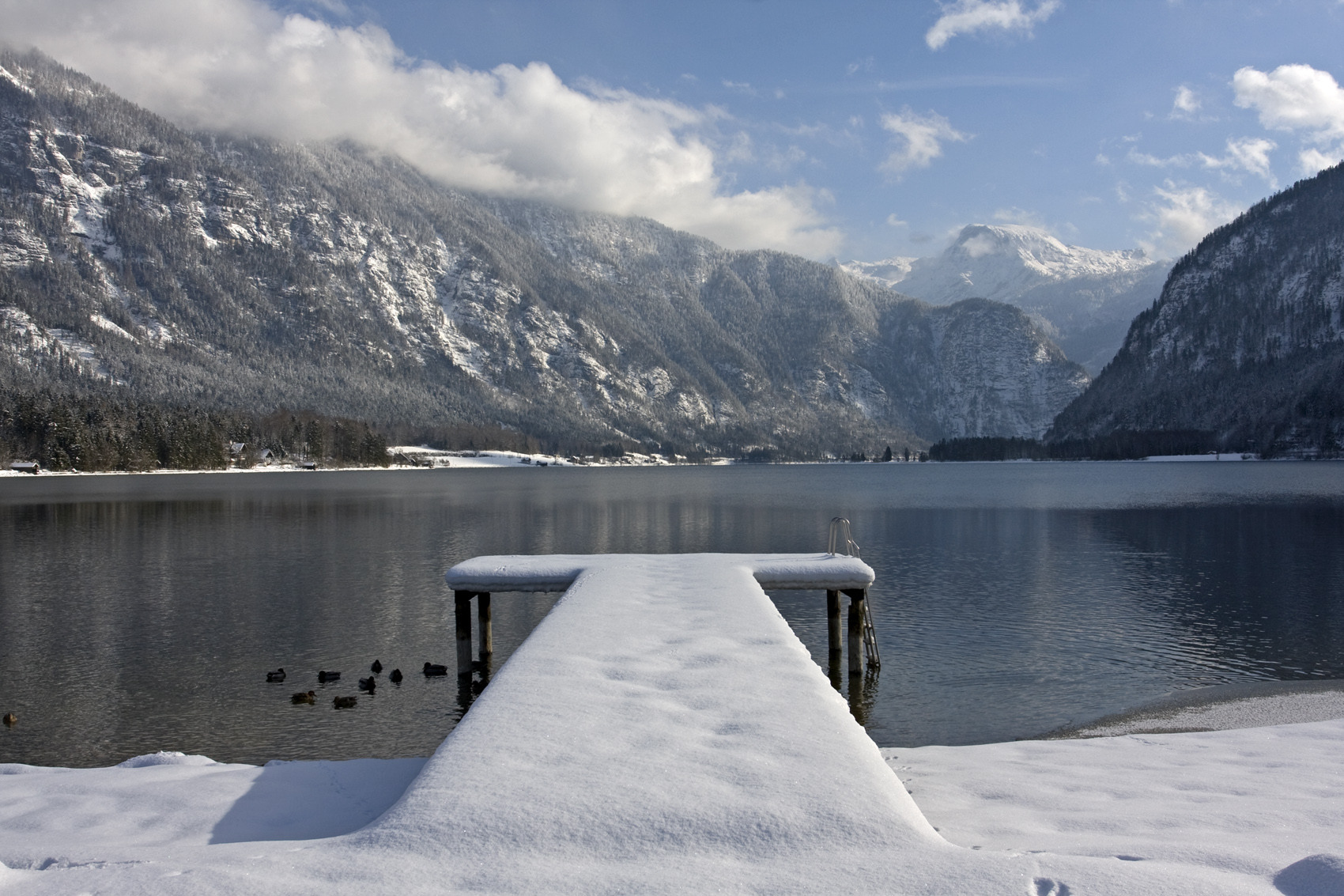 Blick vom Strandbad Untersee/Bad Goisern über den Hallstättersee zum Dachstein, Links im Bild - der Sarstein)